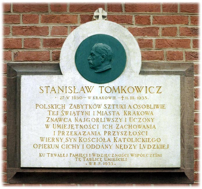 Epitafium Stanisława Tomkowicza na południowej ścianie Bazyliki Mariackiej w Krakowie, fot. T. Łopatkiewicz